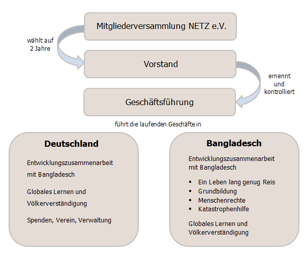 Organigramm NETZ Bangladesch